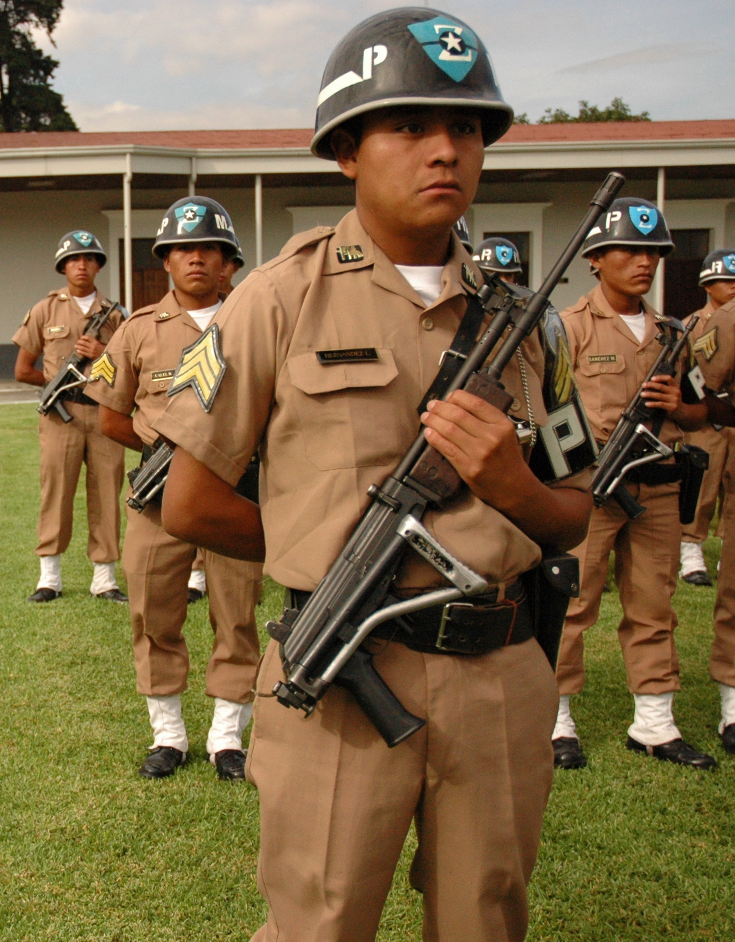 sous-officier de police militaire guatemaltèque armée d'un Galil